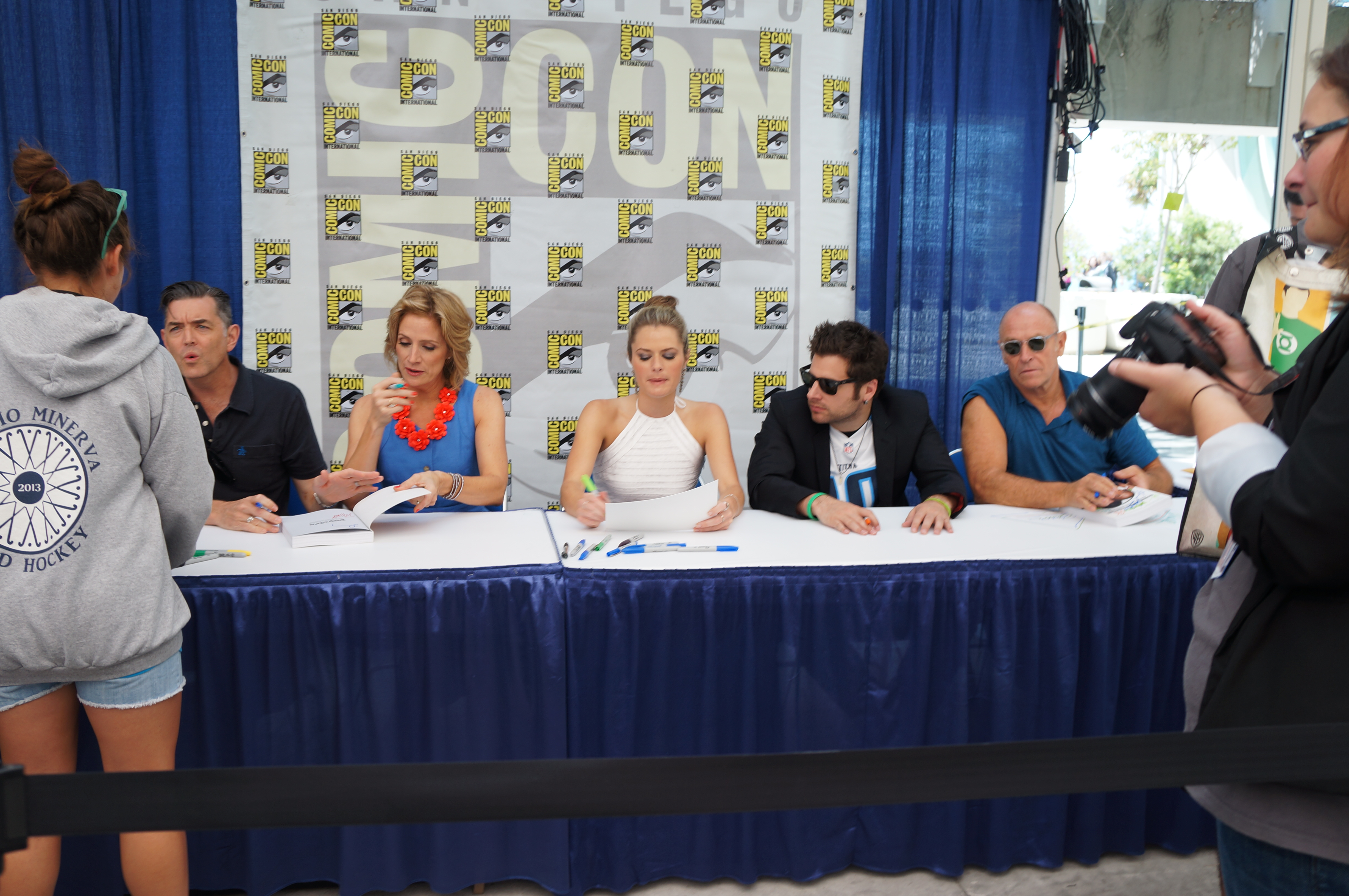 Psych Signing